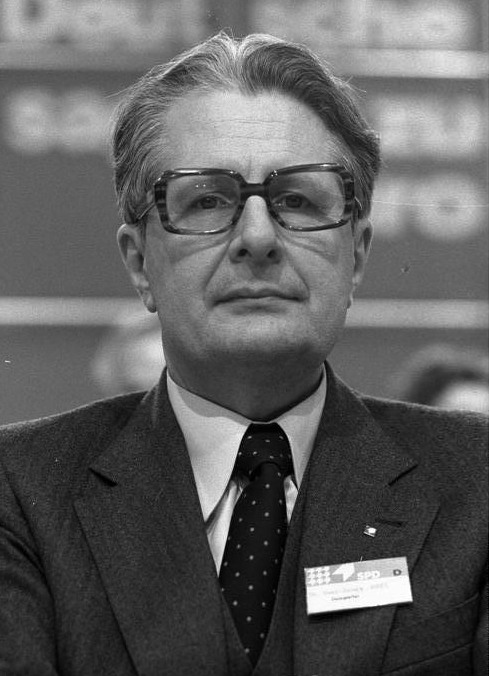 Außerordentlicher Parteitag der SPD im Messe-Kongreß-Zentrum in Köln zur Vorbereitung für die Europa-Parlament-Wahl 1979